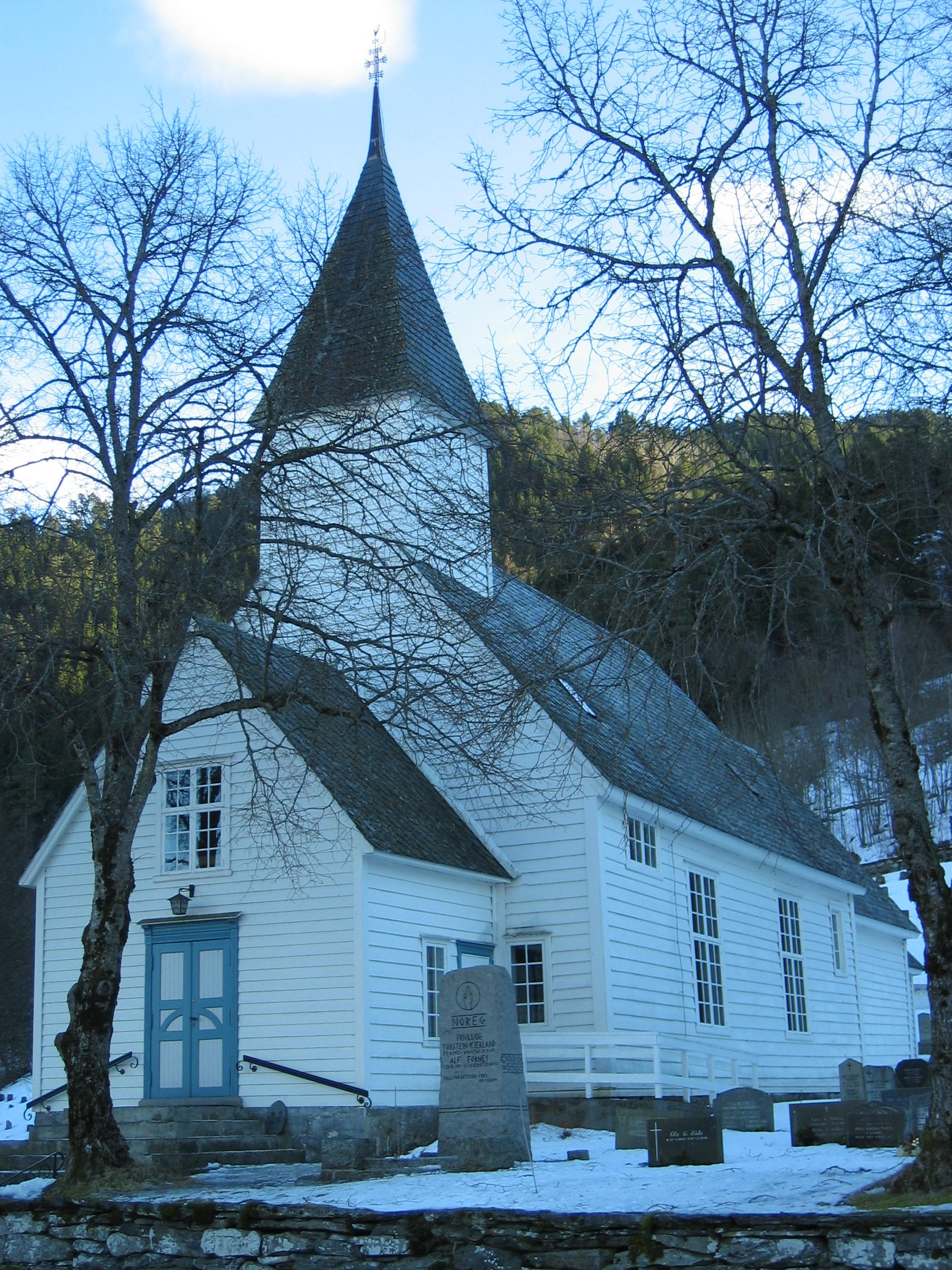 Granvin kyrkje, Hordaland, Norway